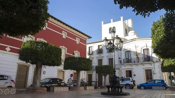 plaza